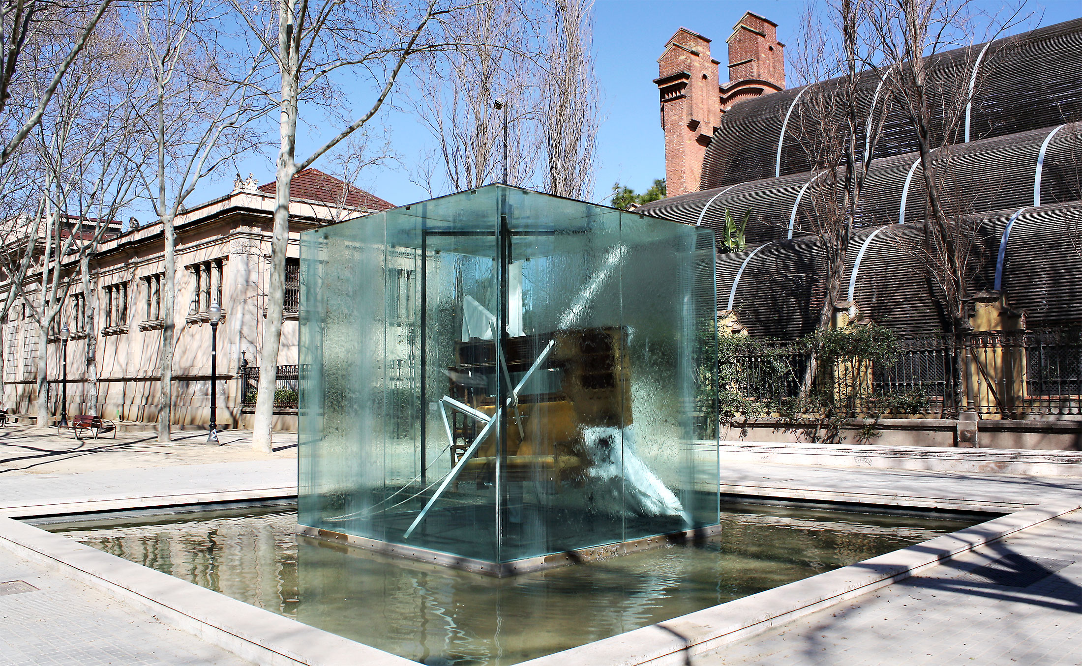 Hommage a Picasso de Antonio Tàpies